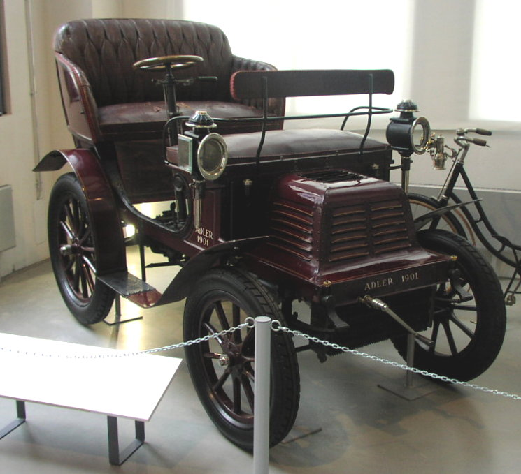 Adler Vis-à-vis Kardanwagen (1901)